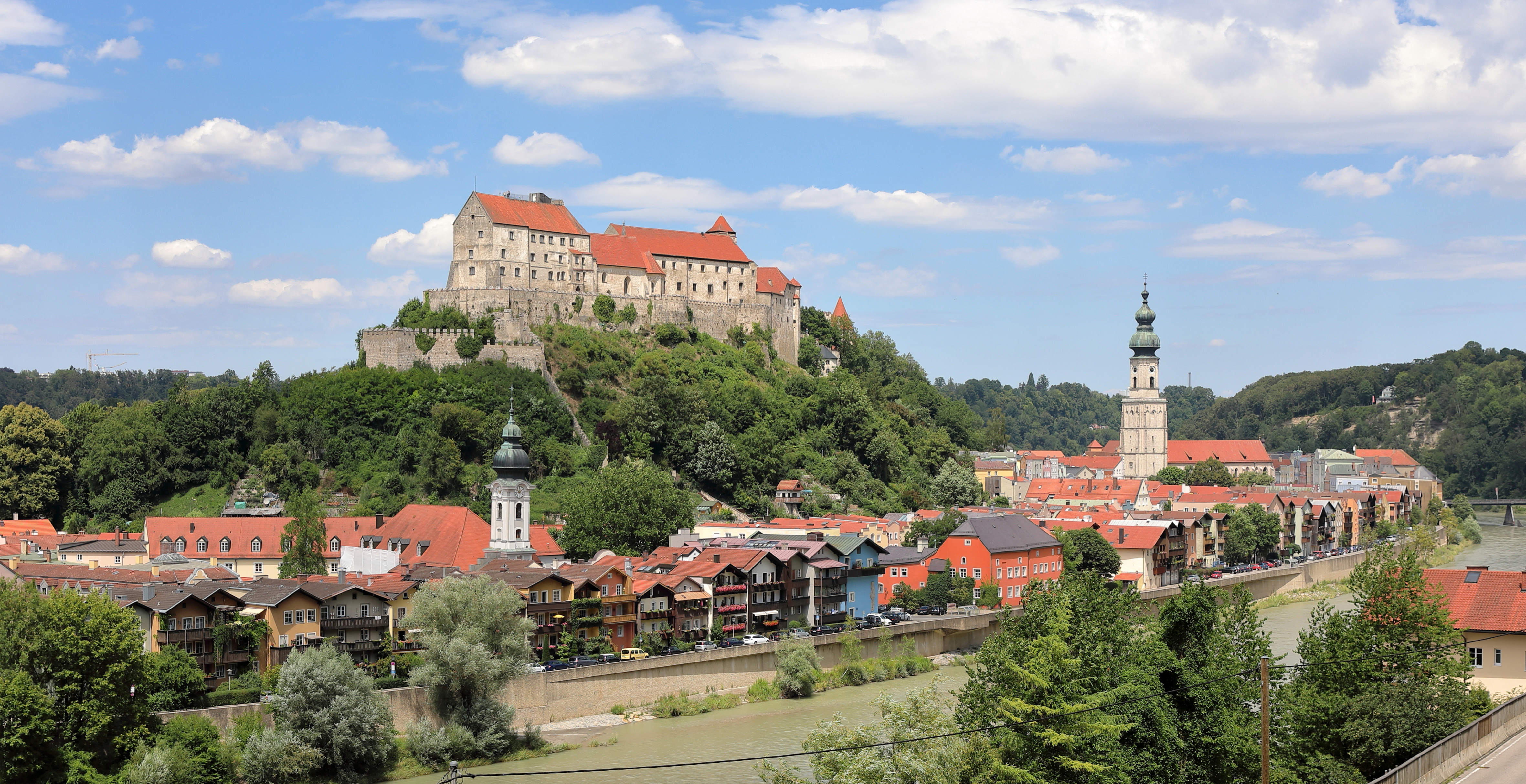 Südansicht der Altstadt der deutschen Herzogstadt Burghausen im oberbayerischen Landkreis Altötting.